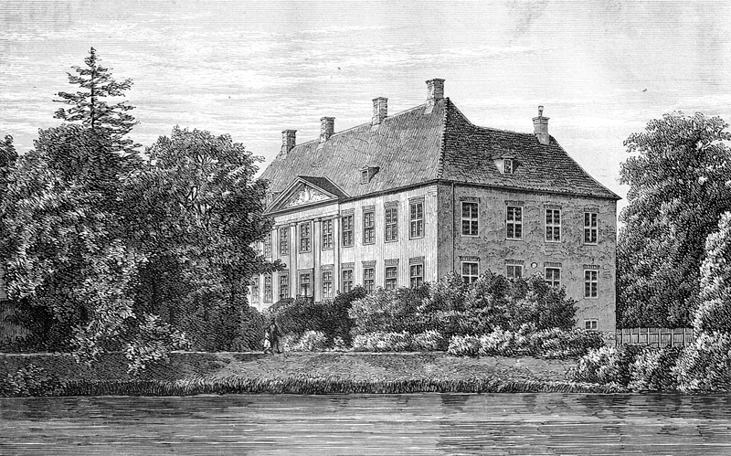 Herregården Nysø nordvest for Præstø blev opført 1671-73 for købmanden Jens Lauridsen.